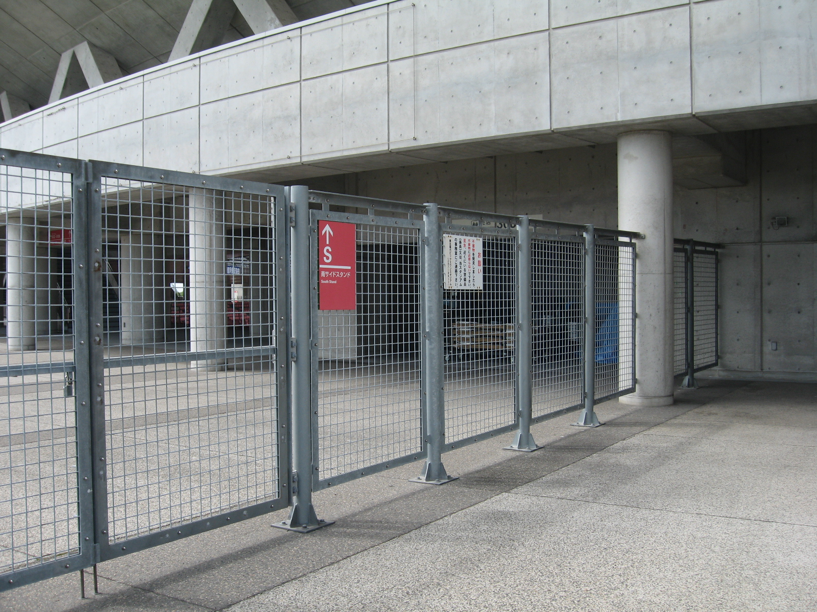 新潟市中央区。新潟スタジアムの警備用フェンス。